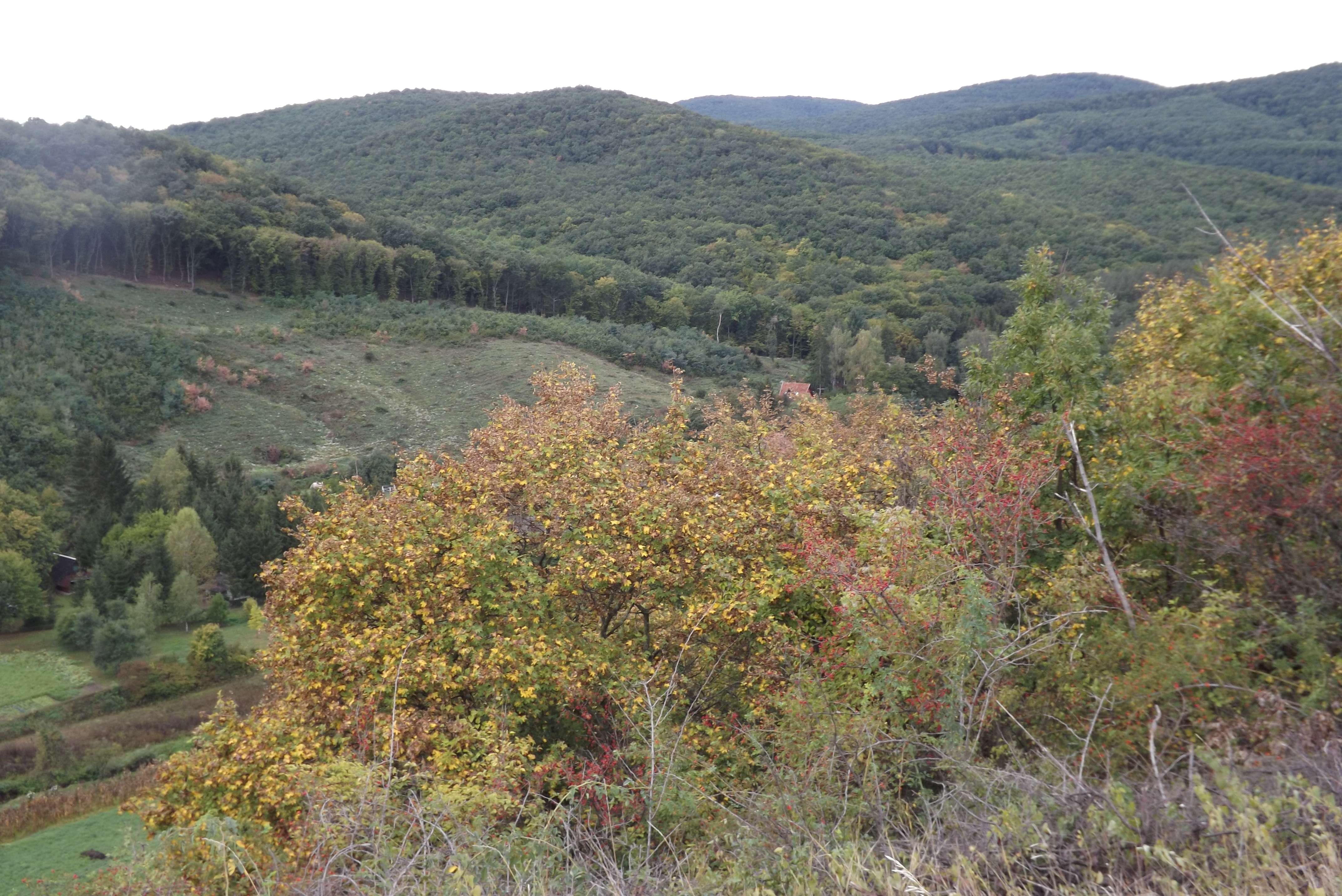 Rálátás a völgyre a Latortetőről